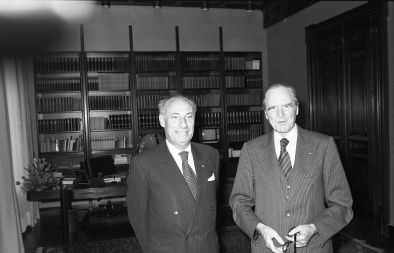 Bundespräsident Carl Carstens empfängt Botschafter Herbert Weil (Gahna) im Bundespräsidialamt.